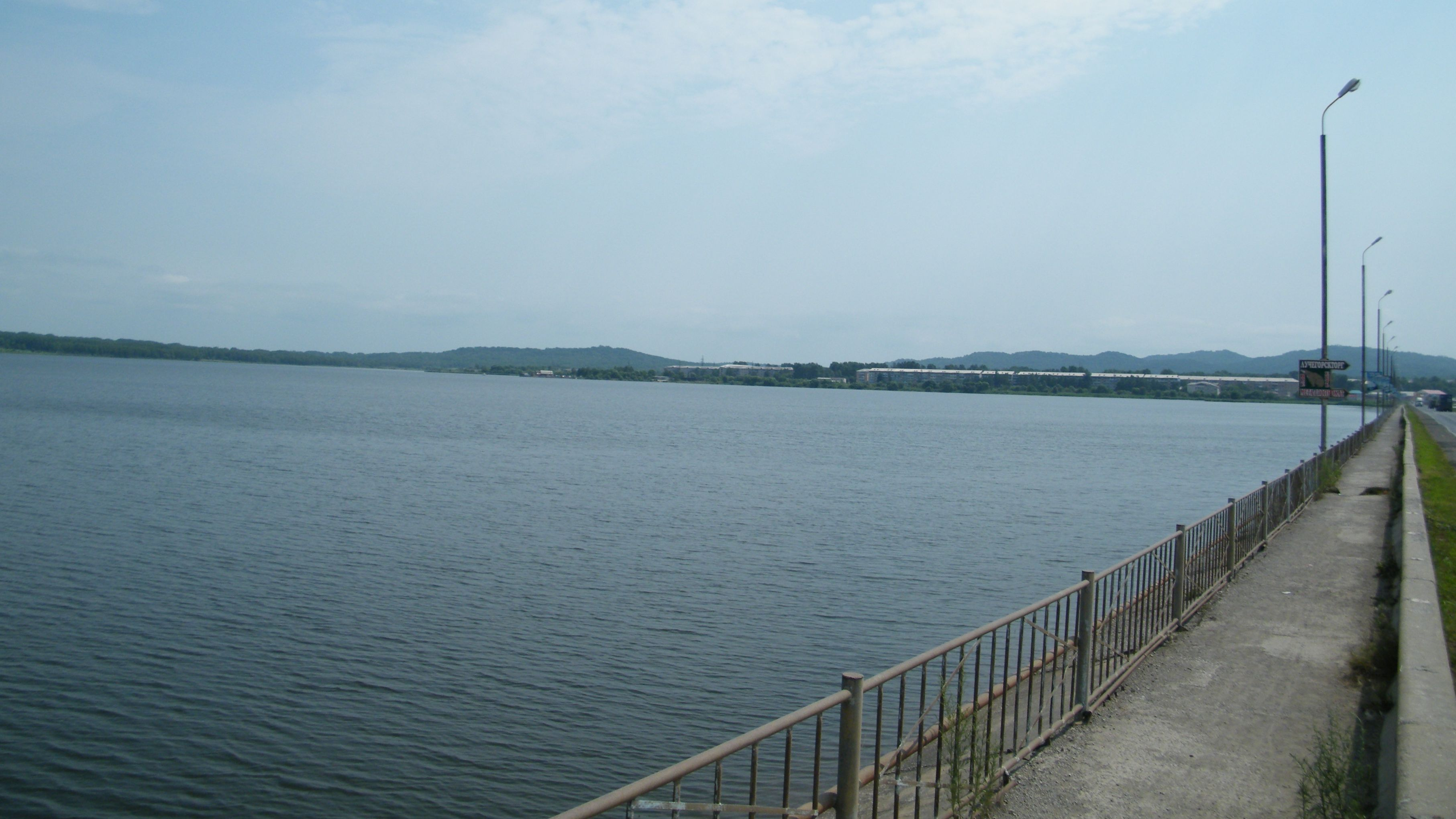 Лучегорское водохранилище на реке Контровод, посёлок Лучегорск Приморского края.